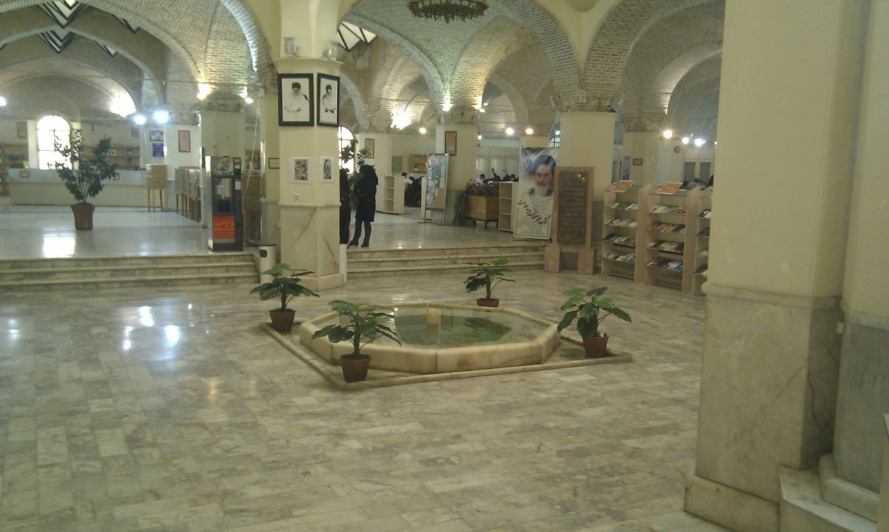 درس باستان شناسی